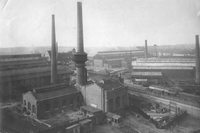 Blick aus Nordosten auf die Germaniawerft I in Kiel, im Hintergrund die Kieler Hörn